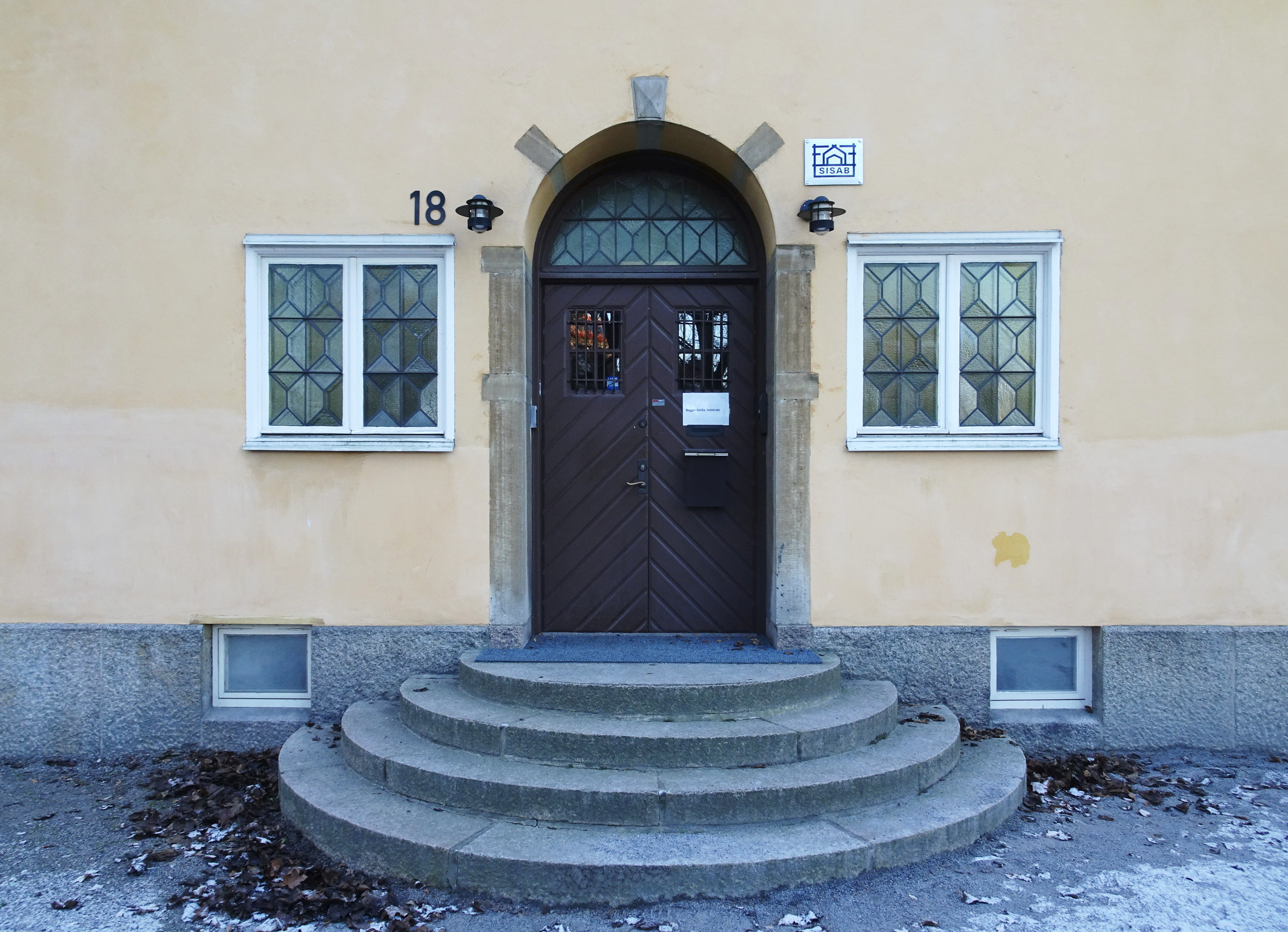 Reggio Emilia Institutet på Campus Konradsberg, ursprungligen Intendentvilla för Konradsberg, arkitekt Ture Stenberg (1914)